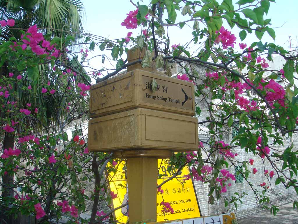 中文（香港）: 屏山文物徑路標。